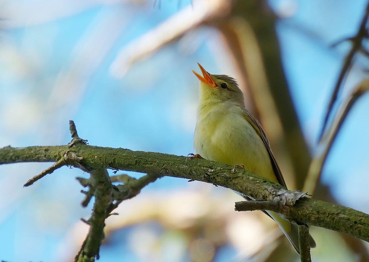 Härmsångare / Icterine Warbler Hippolais icterina, Petgardetrask, Kalmar, Sweden